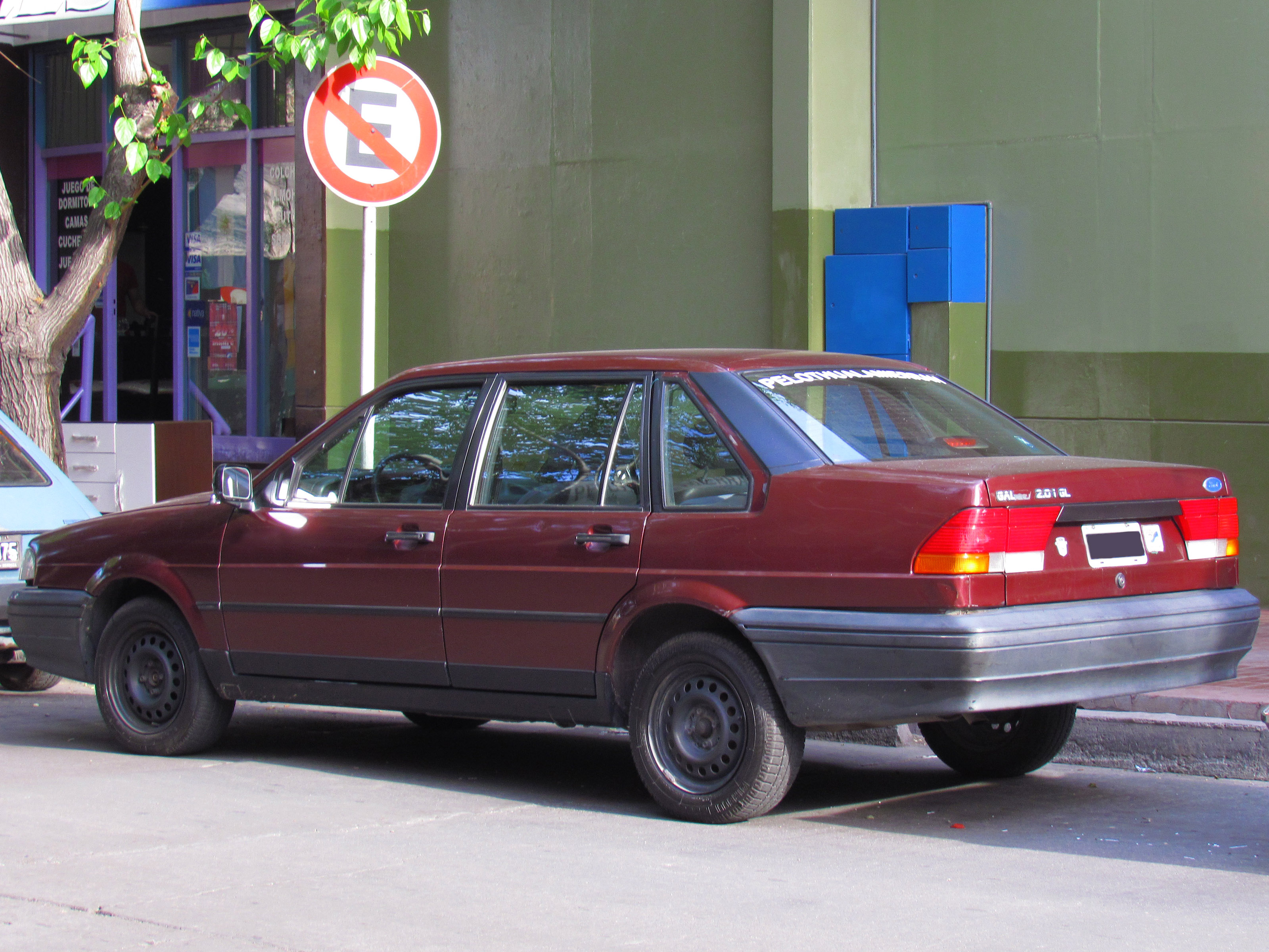 Ford Galaxy 2.0i GL 1992